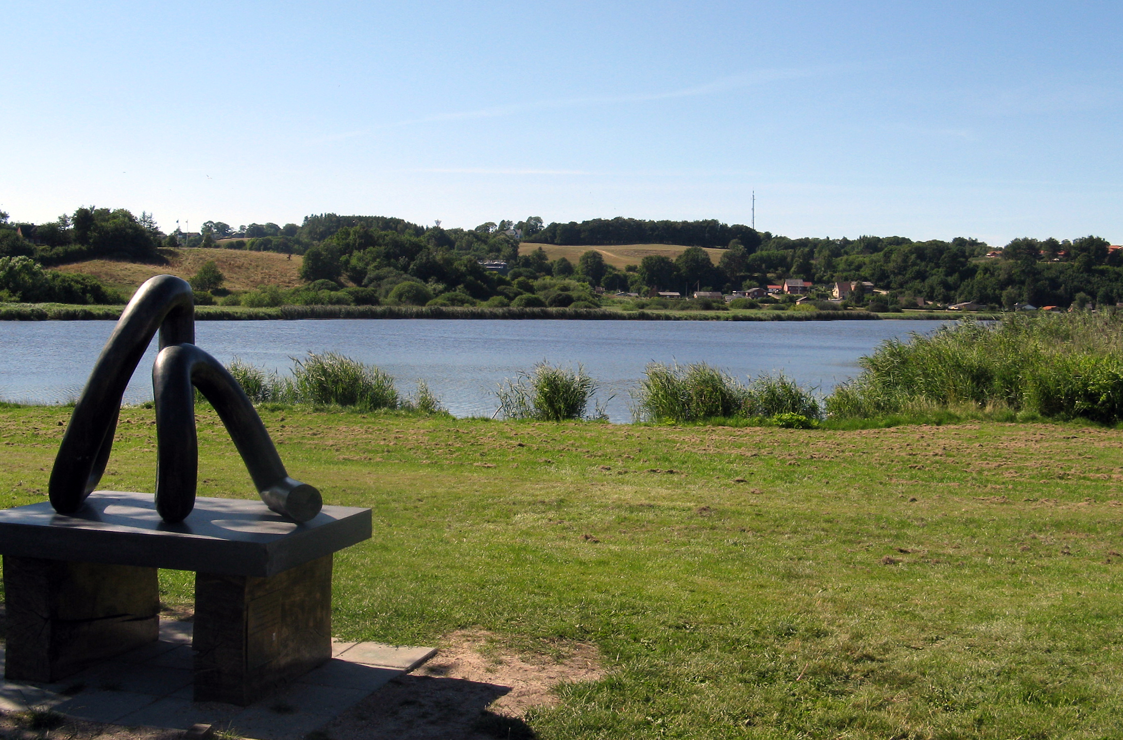 Hobro Vesterfjord set fra Dyrskuepladsen